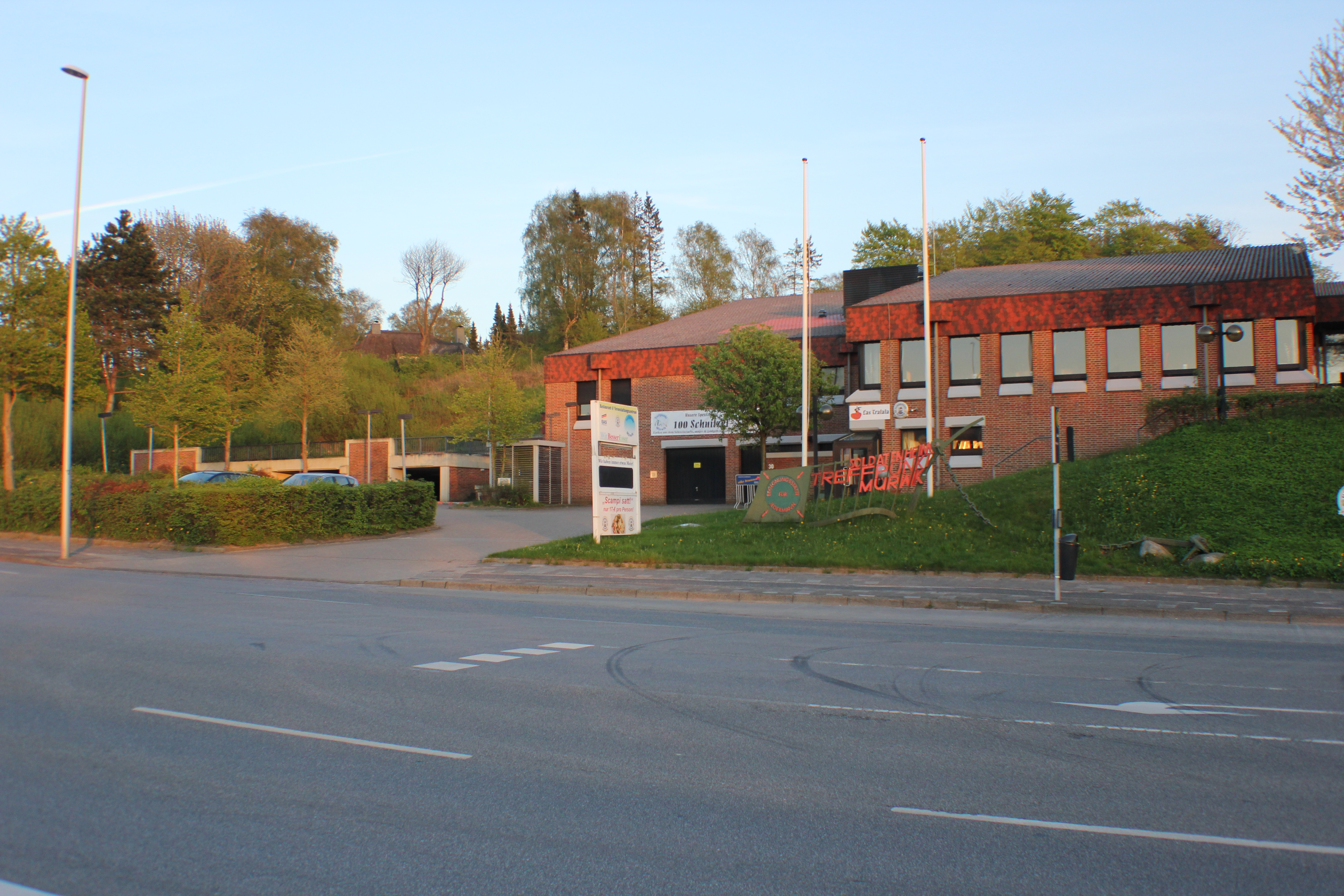 Restaurant Soldatenheim Treffpunkt Mürwik, Kielseng 30, am Rande vom Volkspark (Flensburg), Bild 06